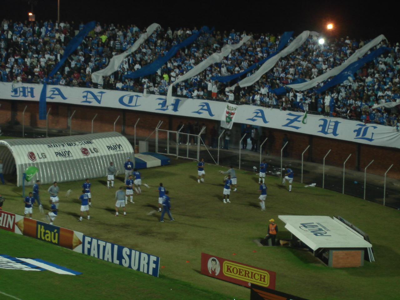 Torcida Mancha Azul do Avaí.